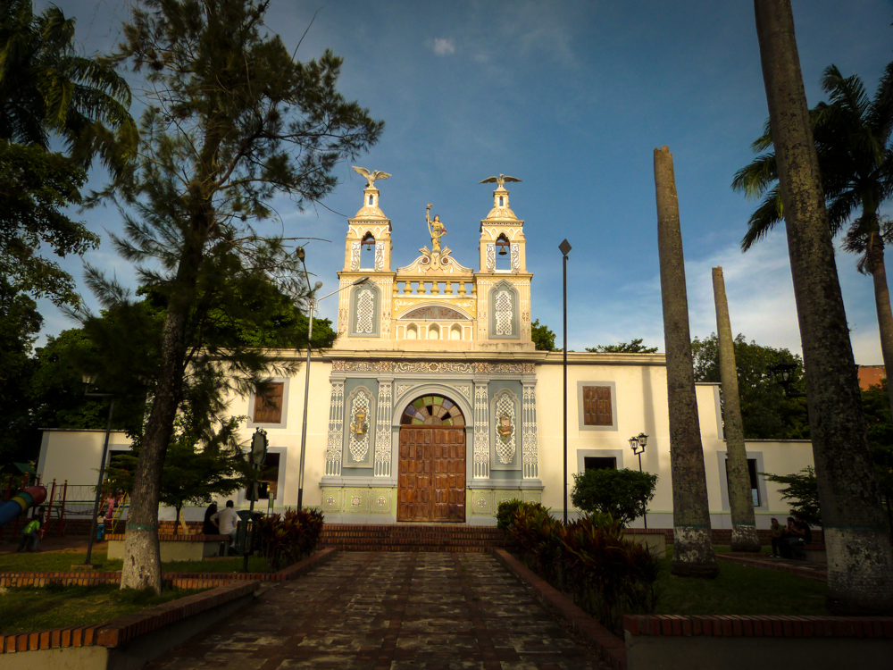 EN EL CENTRO DE SAN CRISTOBAL